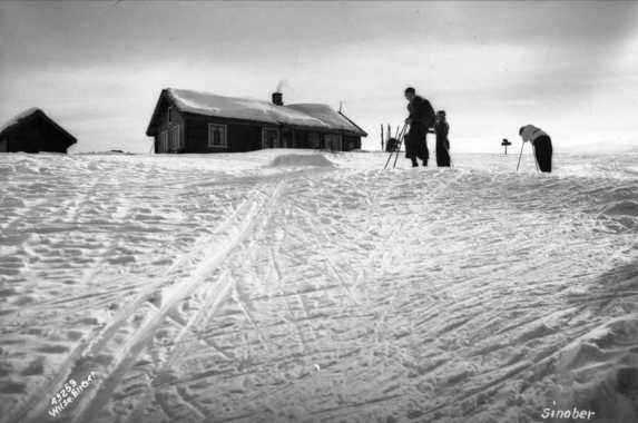 Sinober turisthytte, Lillomarka, 1936